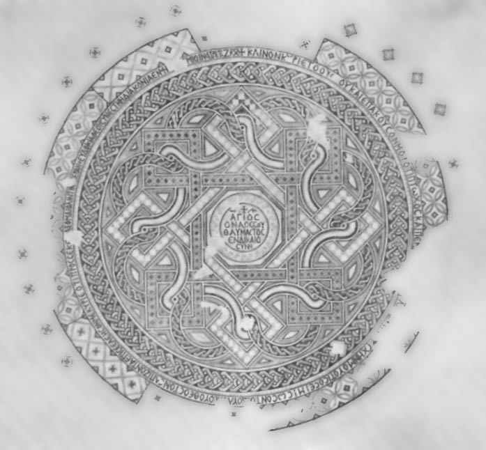 Мозаика в Пропилейской церкви в Джераше. Сейчас она хранится в Йельском университете.